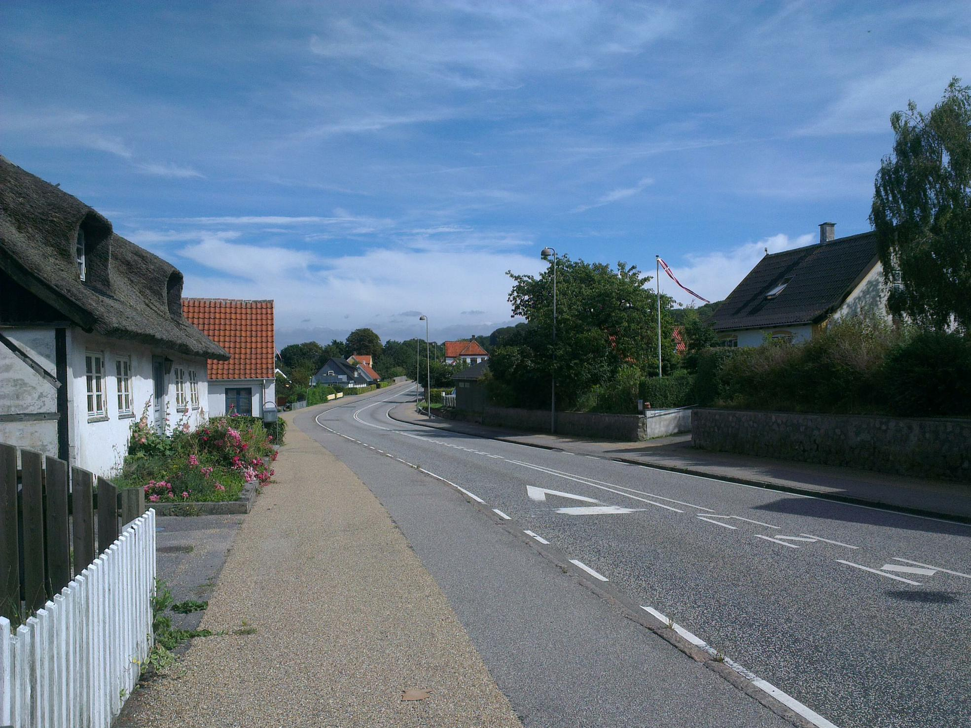 Hovedgaden i Neder Dråby. Set mod øst